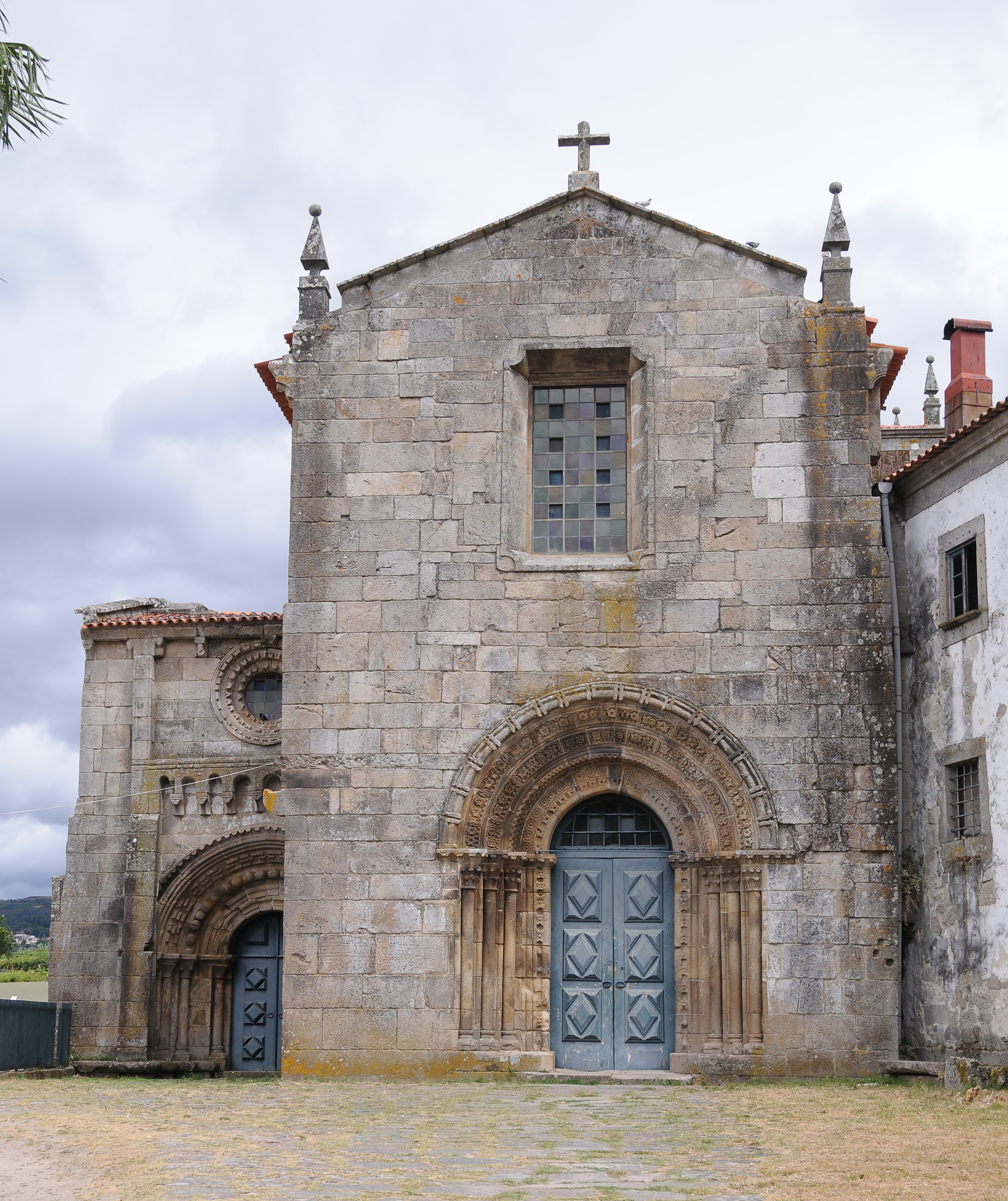 Paderne Church, in Paderne, Melgaço, Portugal